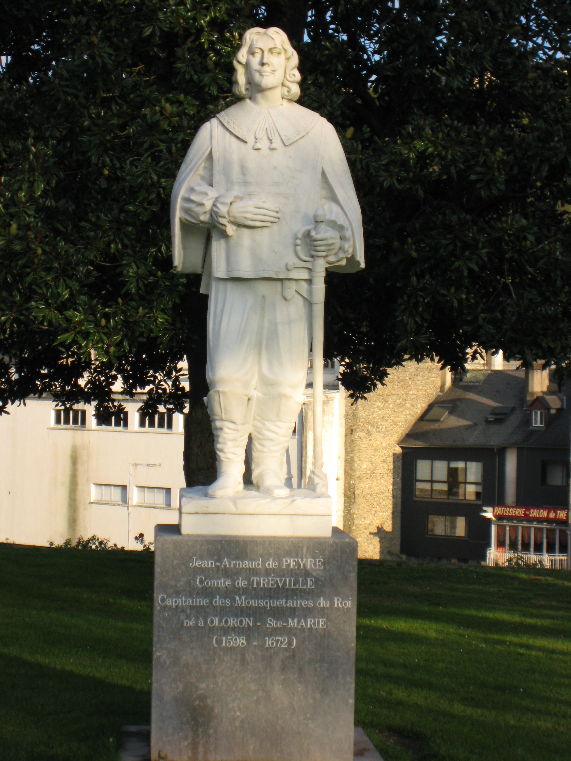 Statue du comte de Tréville né à Oloron-Sainte-Marie (Pyrénées).